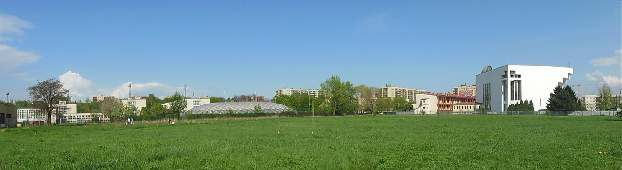 Panorama os. Dywizjonu 303, po prawej Kościół św. Brata Alberta. Kraków.